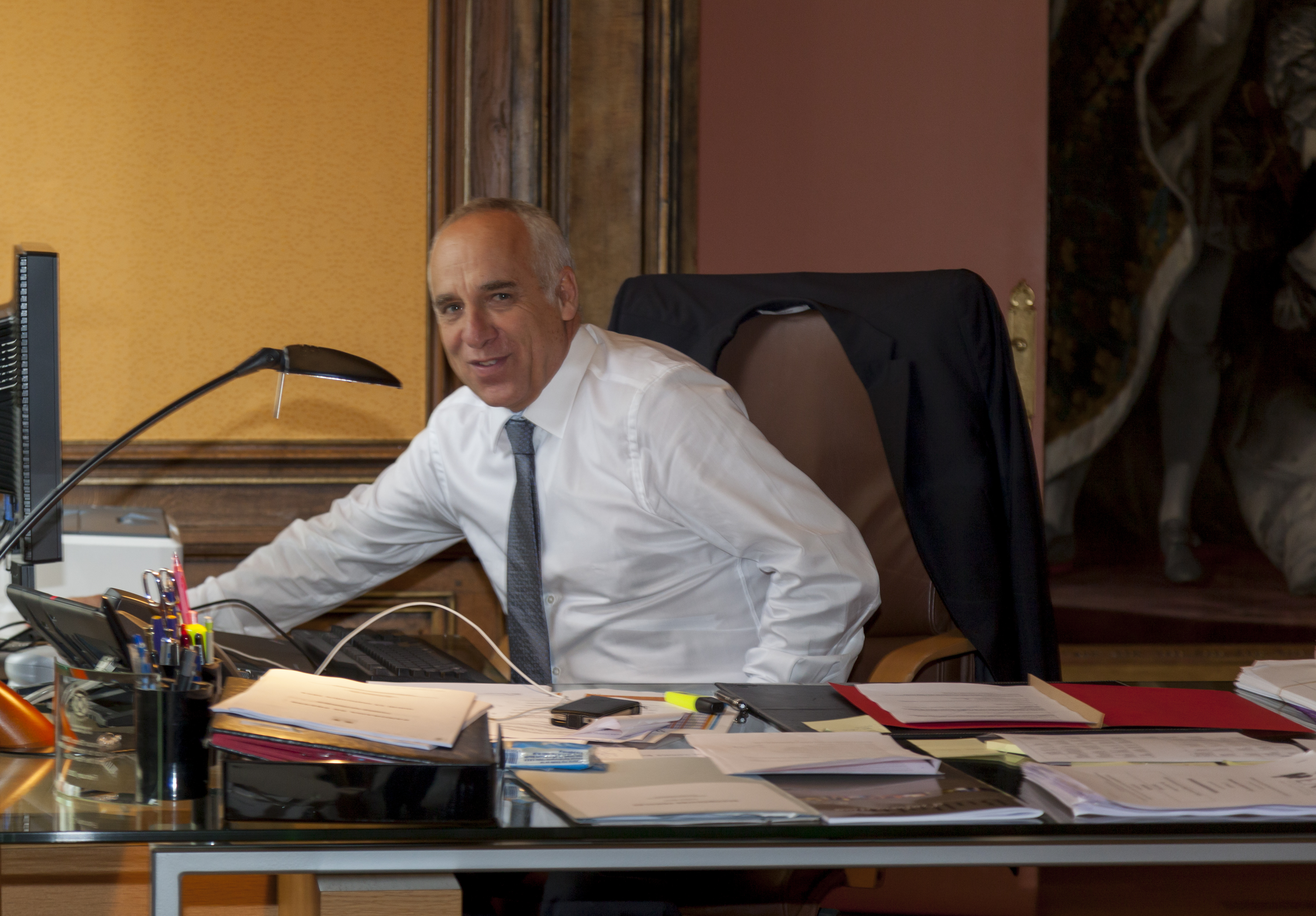 photo pris à mon bureau